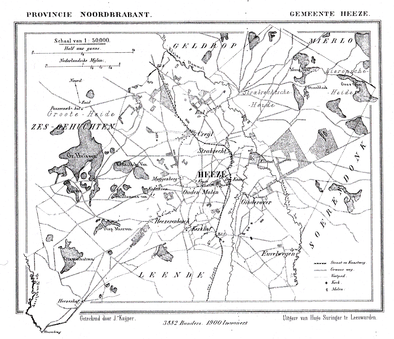 Nederland, Noord-Brabant, Gemeente Heeze